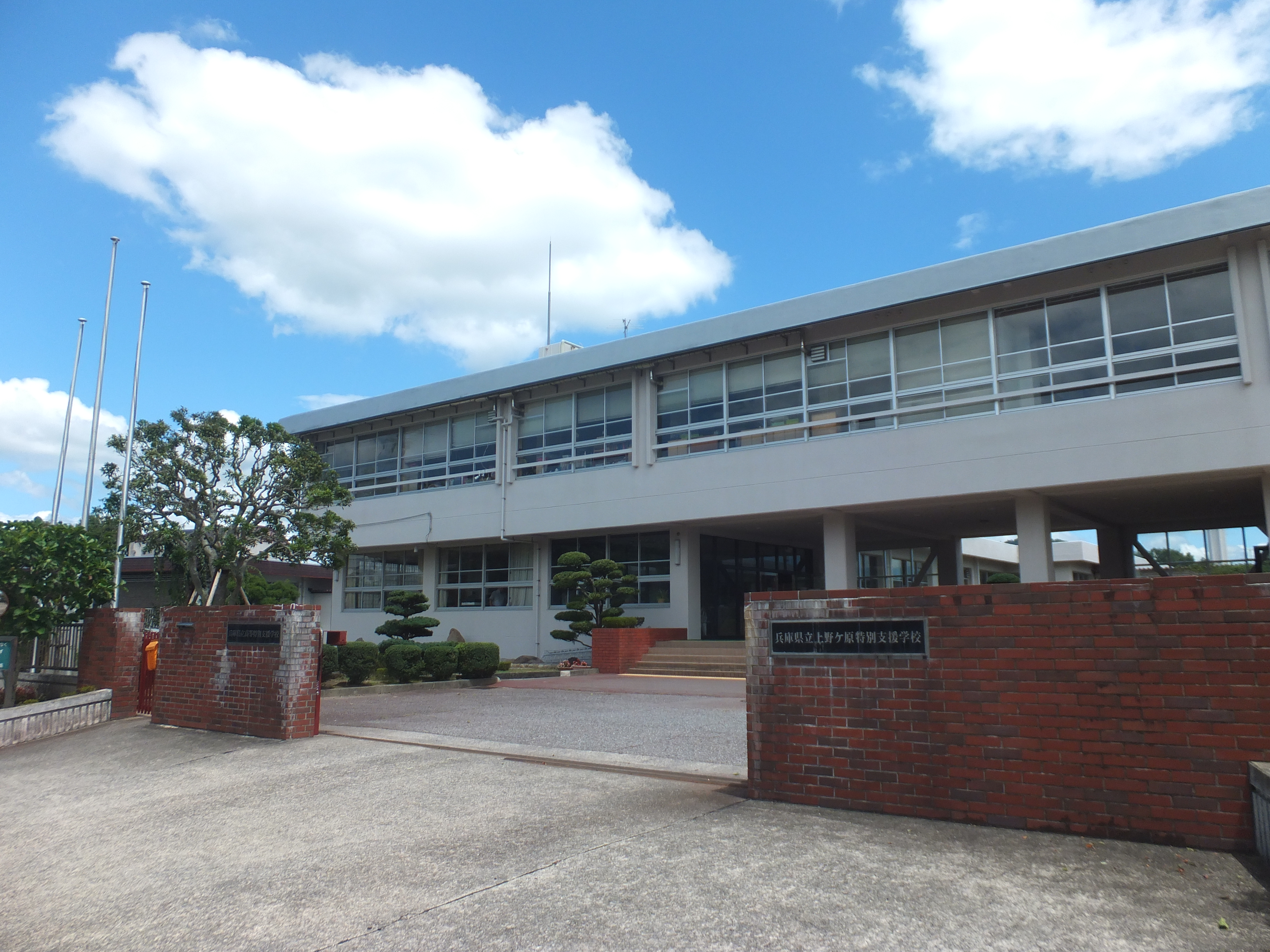 兵庫県立上野ケ原特別支援学校の校門から見た校舎